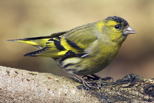 Carduelis spinus ♂